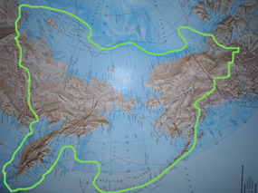 Beringia Map